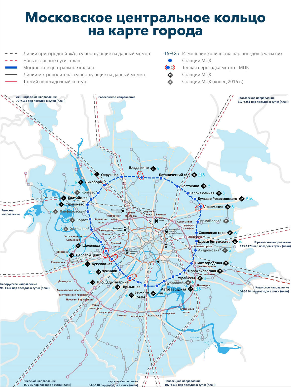 Московское центральное кольцо на карте города